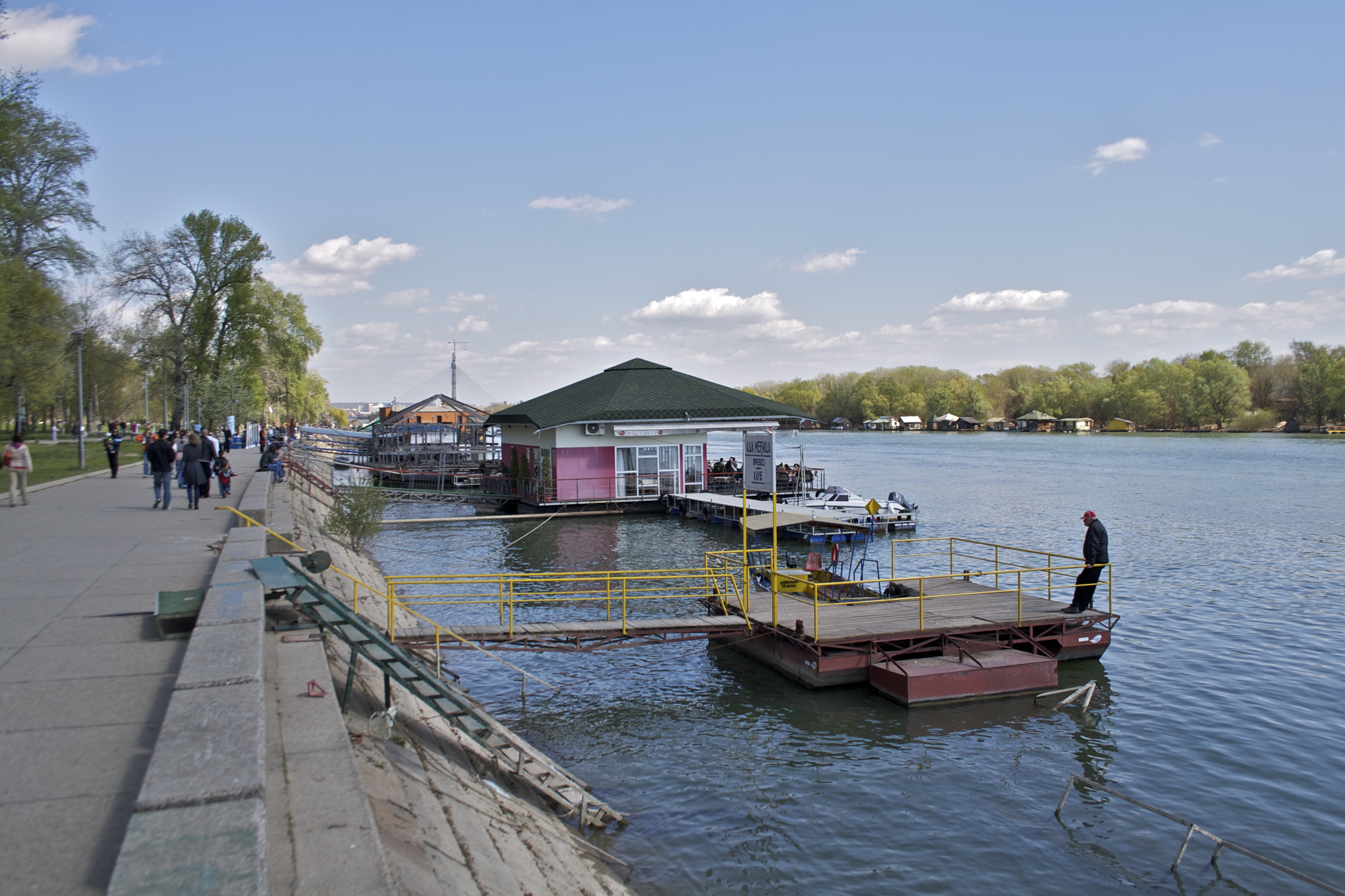 Кеј на Сави поред блокова